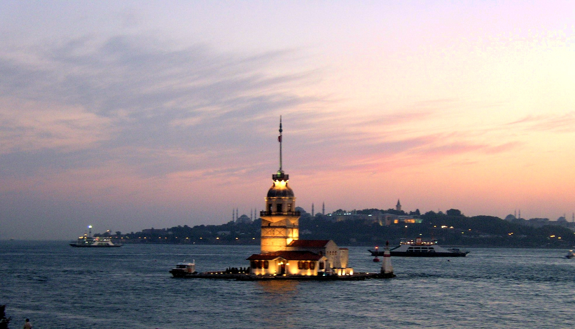 Lo skyline di Istanbul al tramonto visto da Üsküdar Immagine realizzata da pnc_net